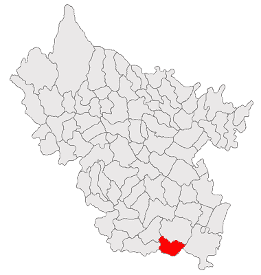 Categorie:Hărţi ale judeţului Buzău